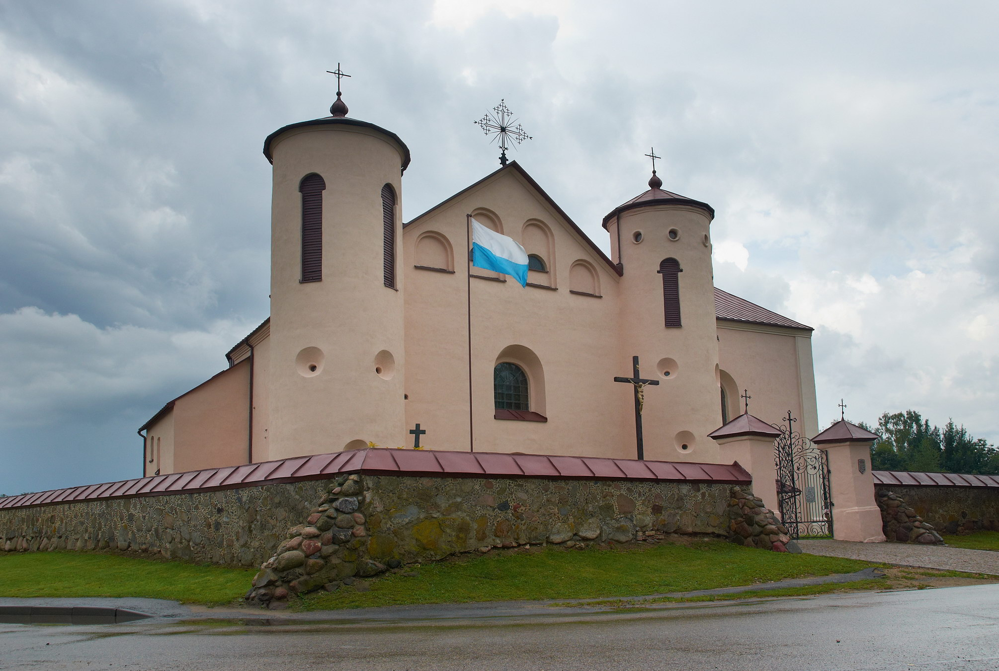 Беларуская (тарашкевіца): Касьцёл Сьвятога Яна Хрысьцiцеля, дэкаратыўнае аздабленьне інтэр’ера касьцёла: росьпісы скляпеньняў, алтары, арган, хоры. в. Камаі